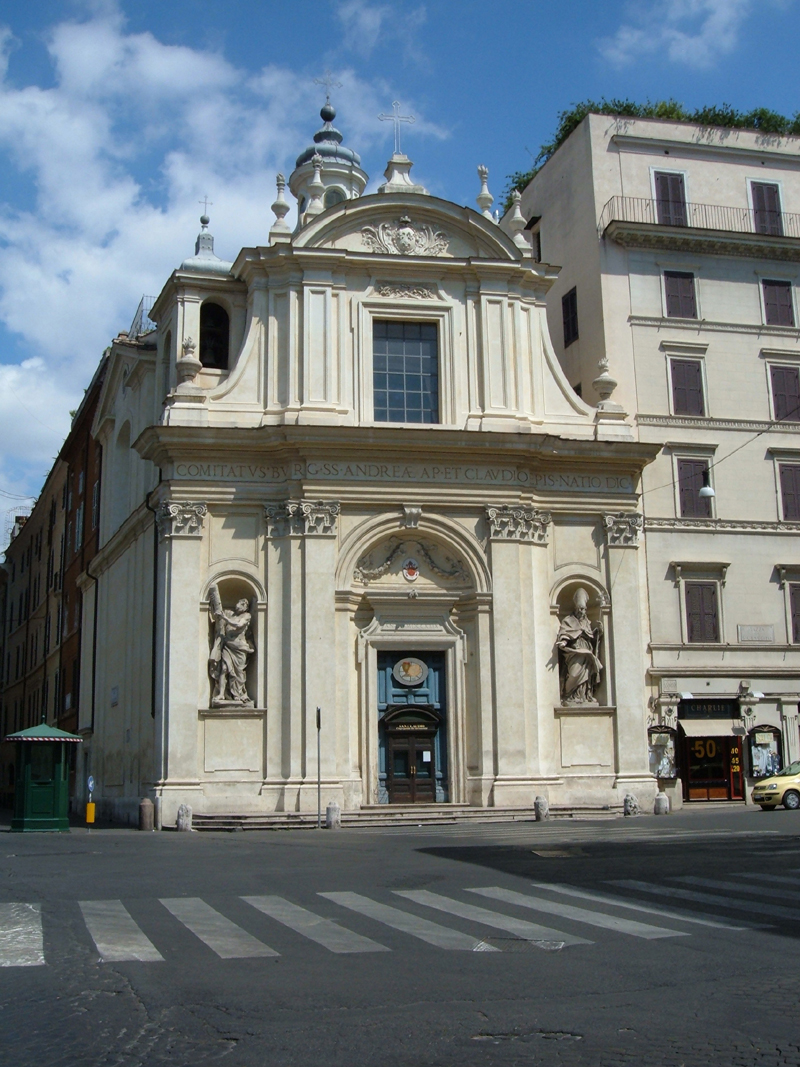 Chiesa dei Santi Andrea e Claudio dei Borgognoni, a Roma, nel rione Trevi. Foto personale.